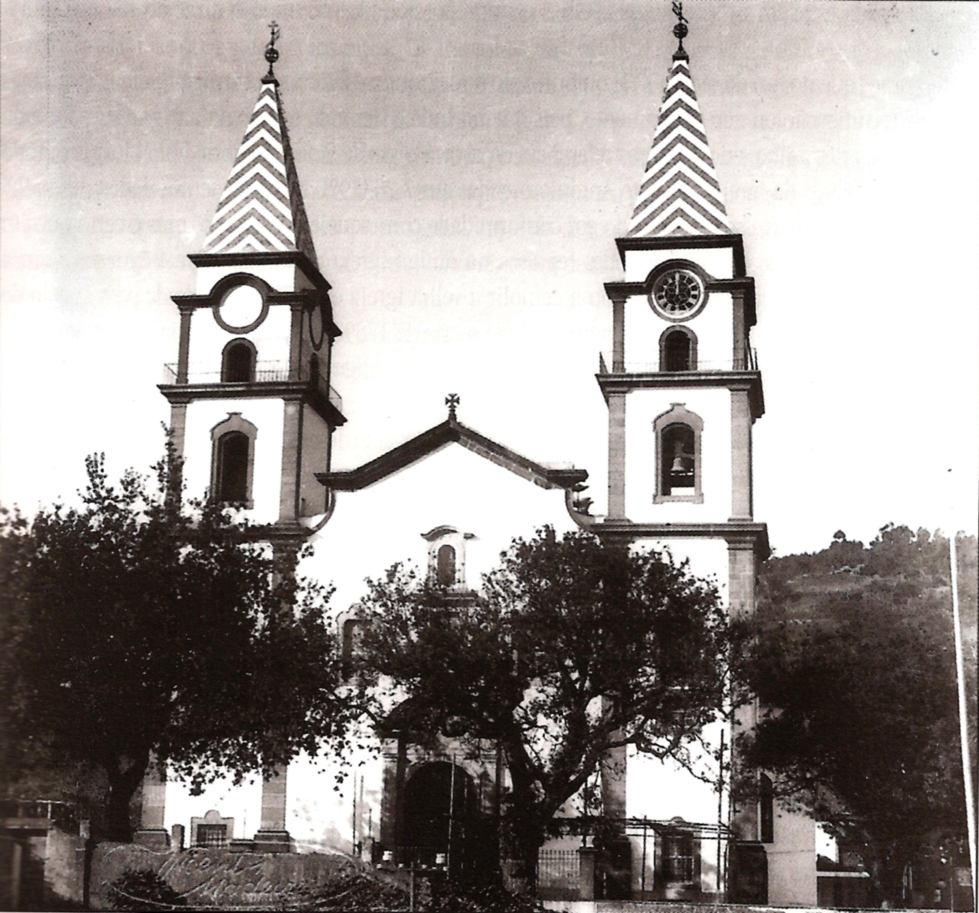 Igreja de Santo António depois de 1928, após a construção dos coruchéus e colocação do relógio.